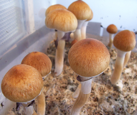 P. cubensis var. Mazatapec